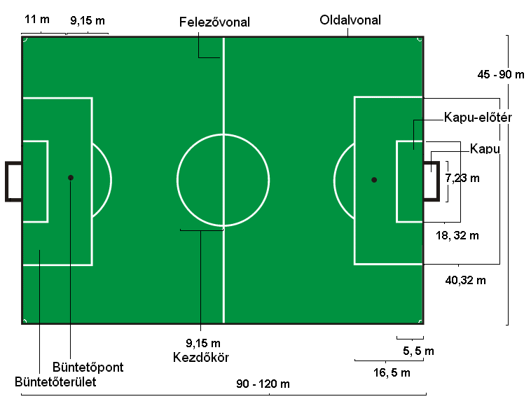 A file:Fussballfeld_mit_Erläuterungen.png magyarítása